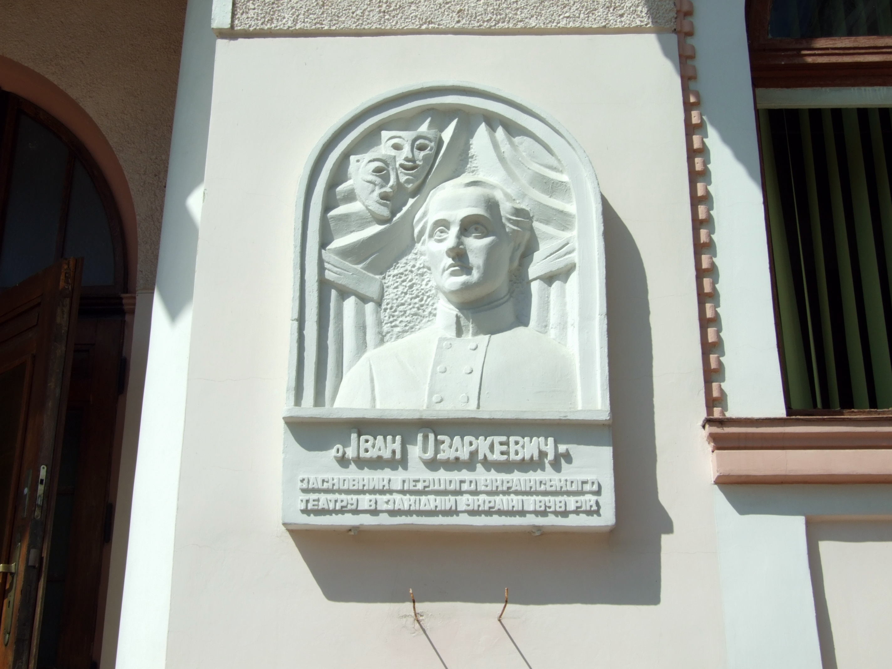 Будинок культури, поч. ХХ ст.